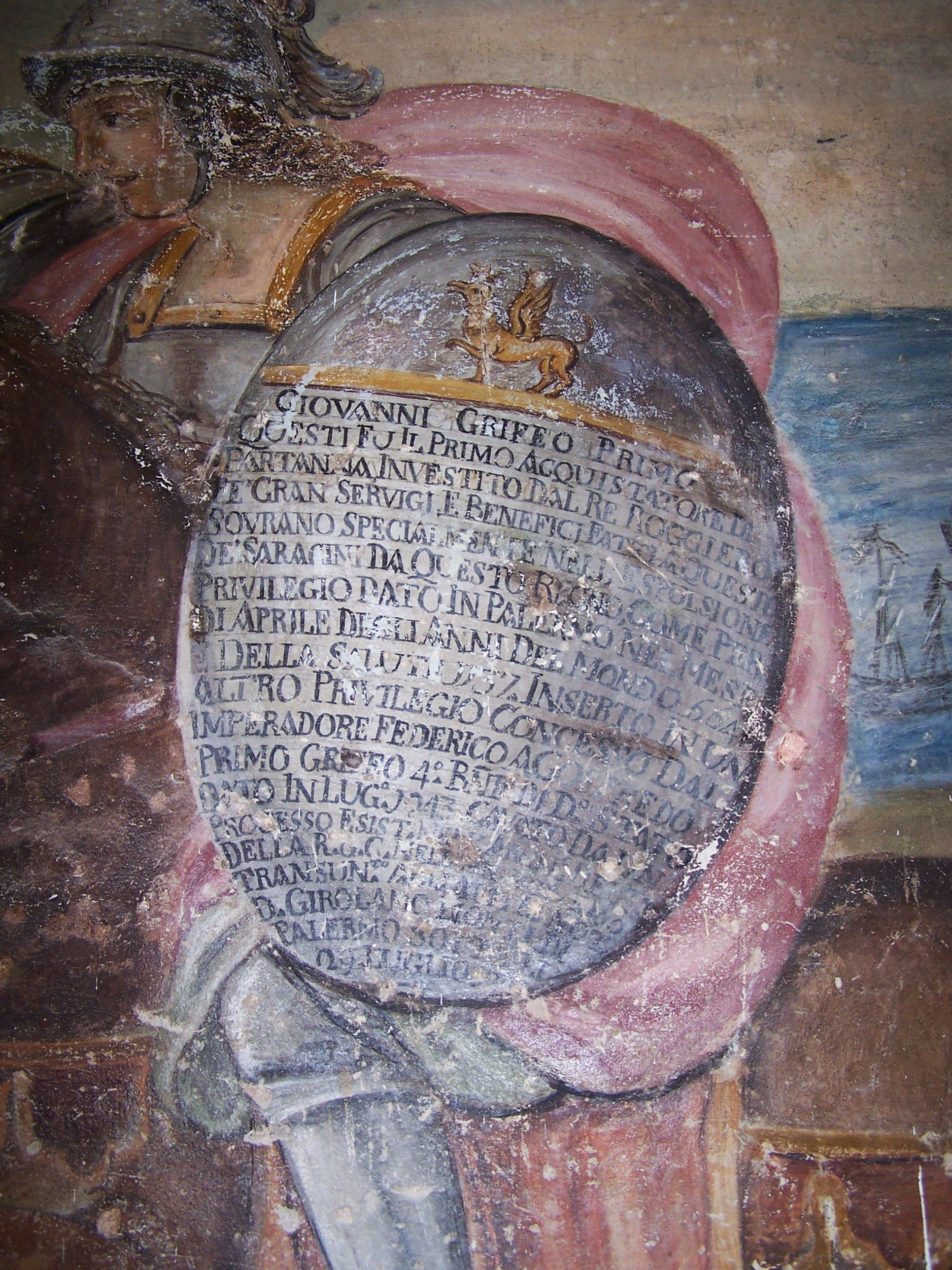 Autore della foto, Peppe64, dal Salone delle Feste al Castello Grifeo, Partanna (Tp)